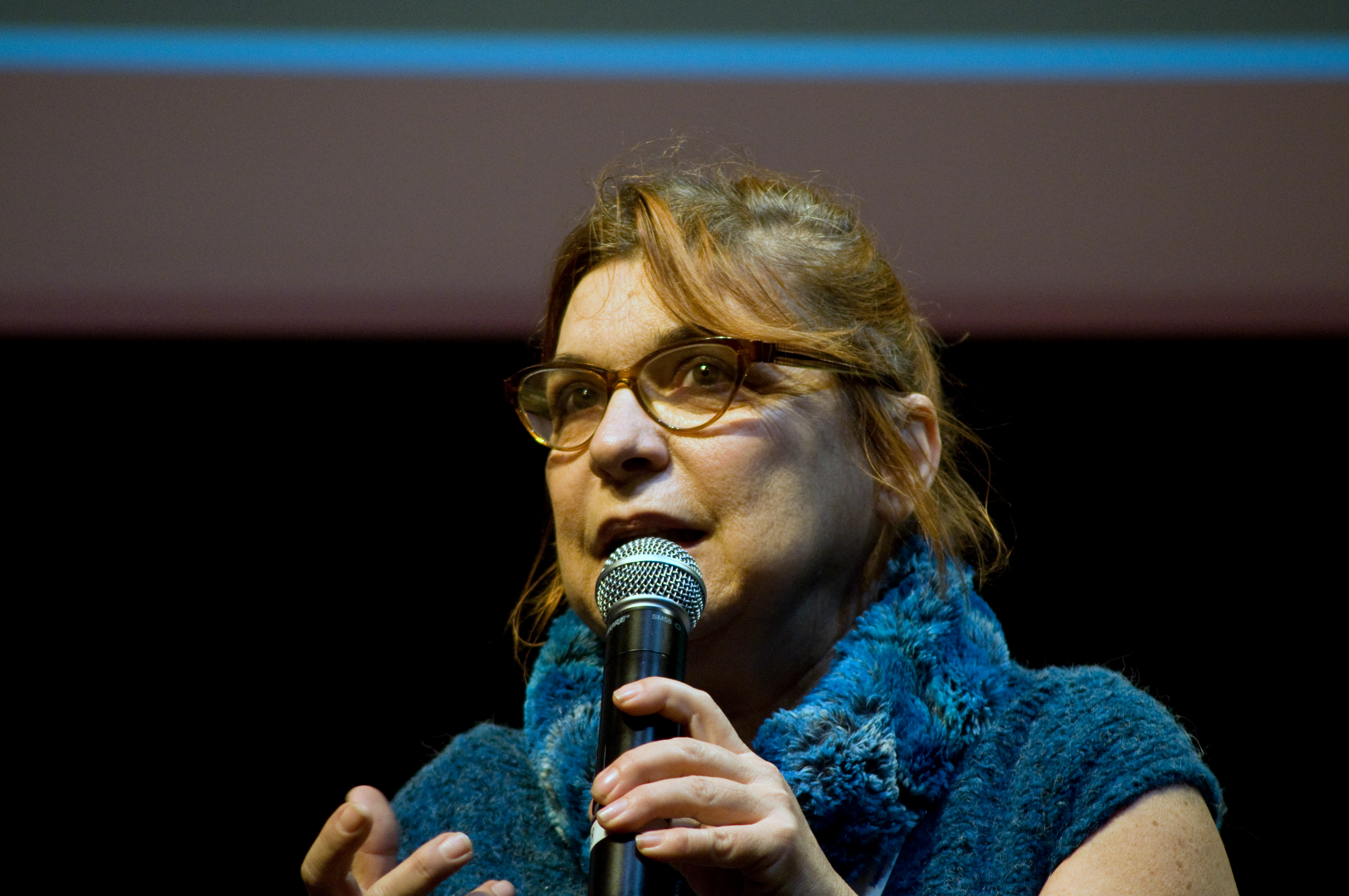 BTO2011 - Syusy Bladi - Stazione Leopolda - 2 Dicembre 2011